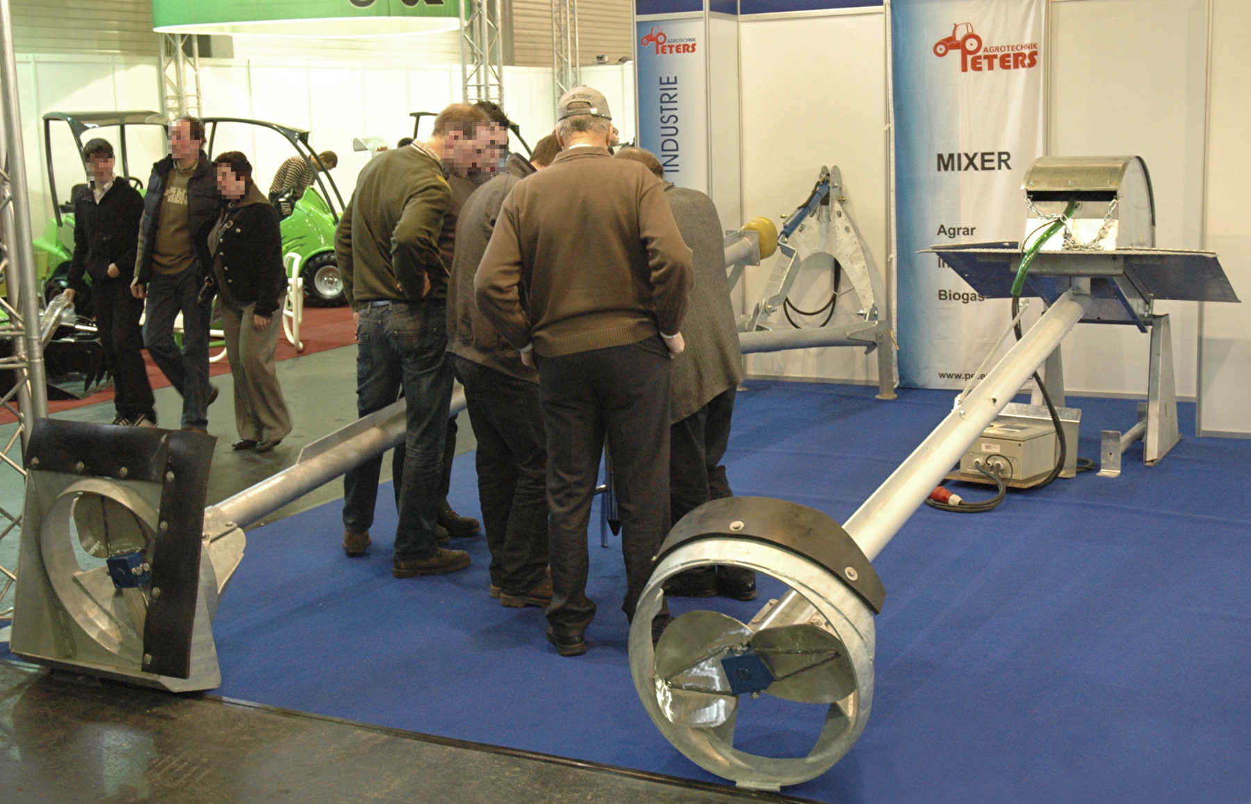 Zwei starre Güllemixer von Maschinenbau Peters (Agrotechnik Peters, Eupen), Agriflanders 2009 – links ein Traktor-/Zapfwellenmixer, rechts ein Elektromixer